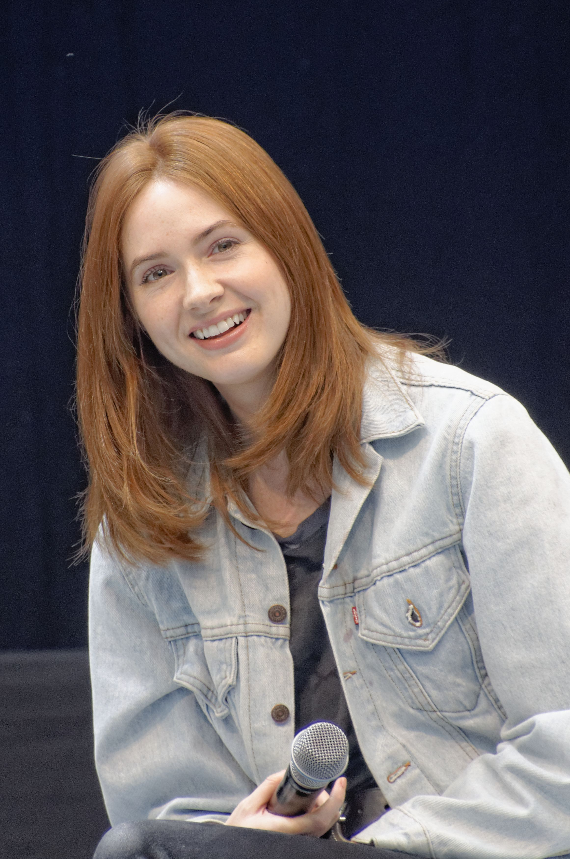 Bilder von der Comic Con Germany 2019 in Stuttgart